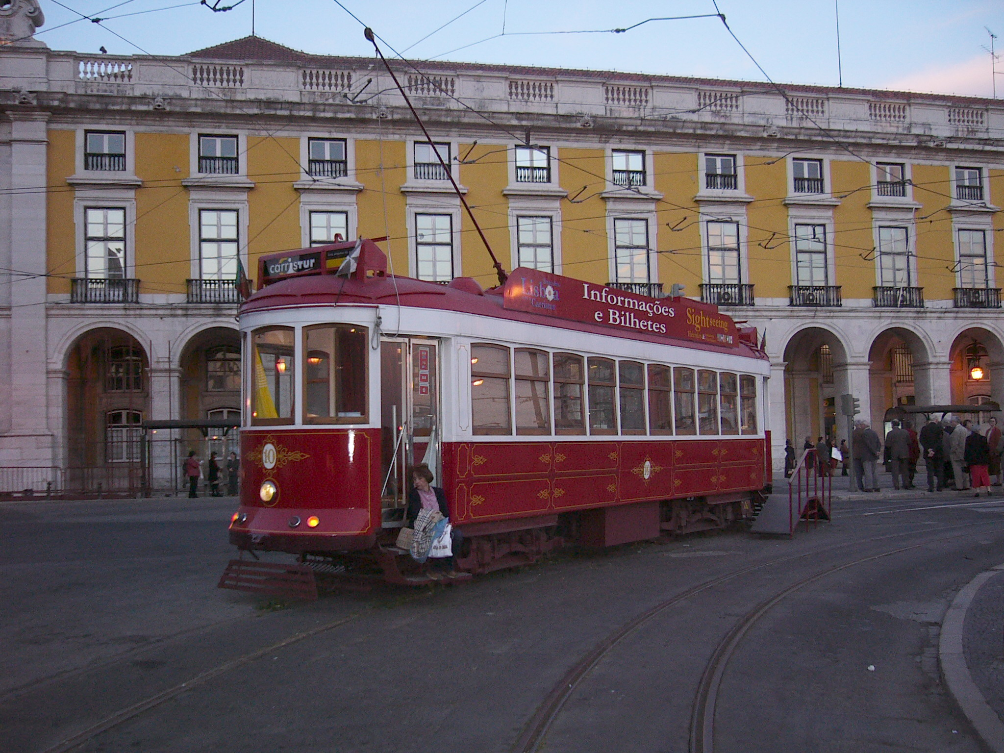 Oficina de turismo y venta de tikets en tranvía de Lisboa. Foto de Manuel González Olaechea y Franco © Descripción: Oficina de turismo y venta de tikets en tranvía Ciudad : Lisboa País : Portugal Fotógrafo: Manuel González Olaechea y Franco © Fecha de la foto : 14 de abril de 2004